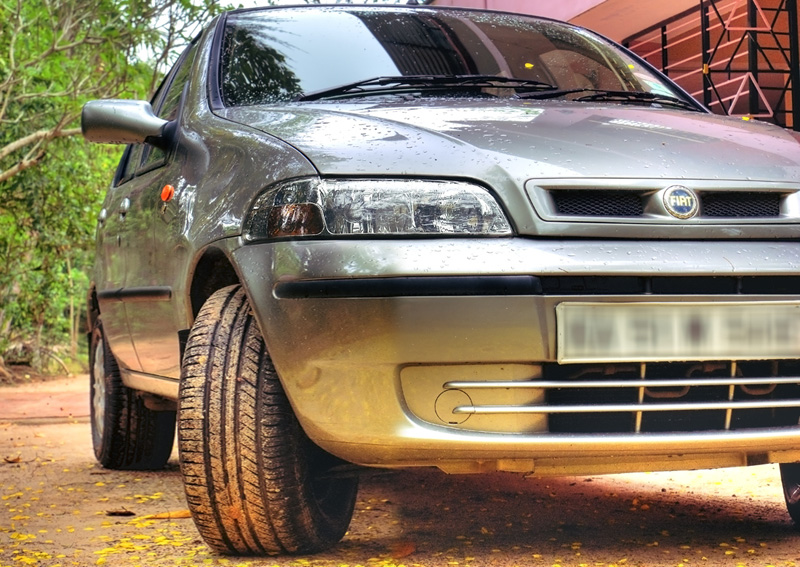 കാറിൻറെ ടയർ.